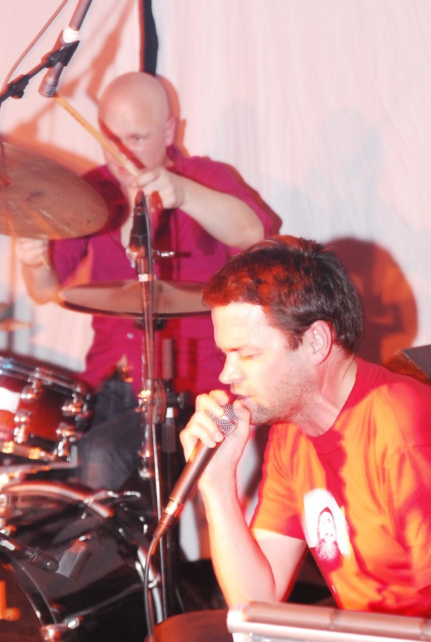 drums: Jarle Vespestad vocal: Arve Henriksen